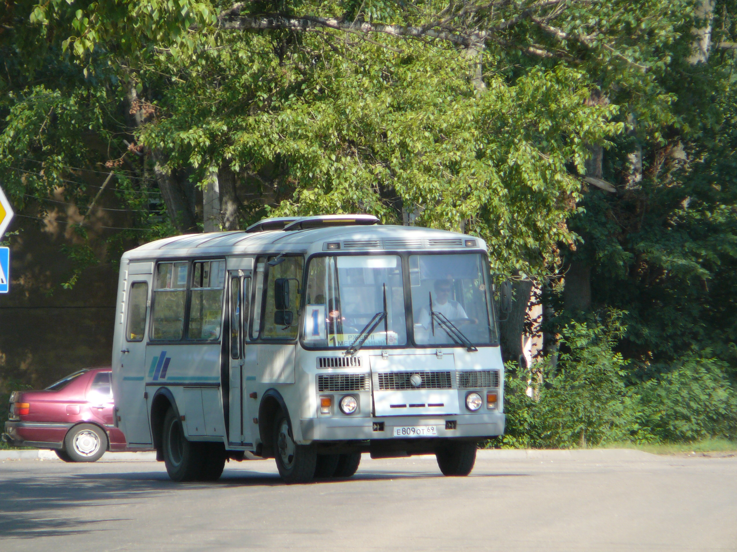 Rzhev, Tver Oblast, Russia